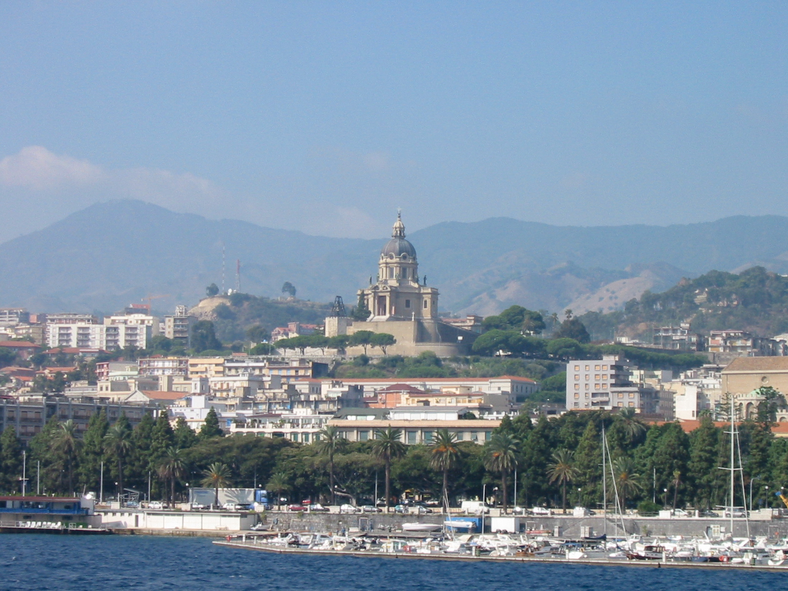 Messina im Herbst 2003